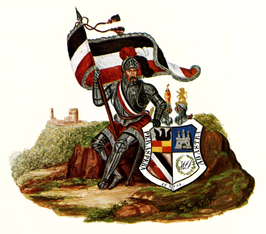 Siehld of Landsmannschaft Hildeso-Cellensia